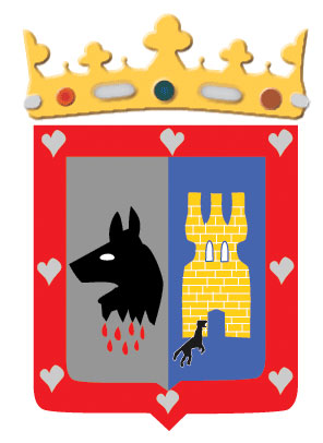 Escudo de Hontoria de la Cantera